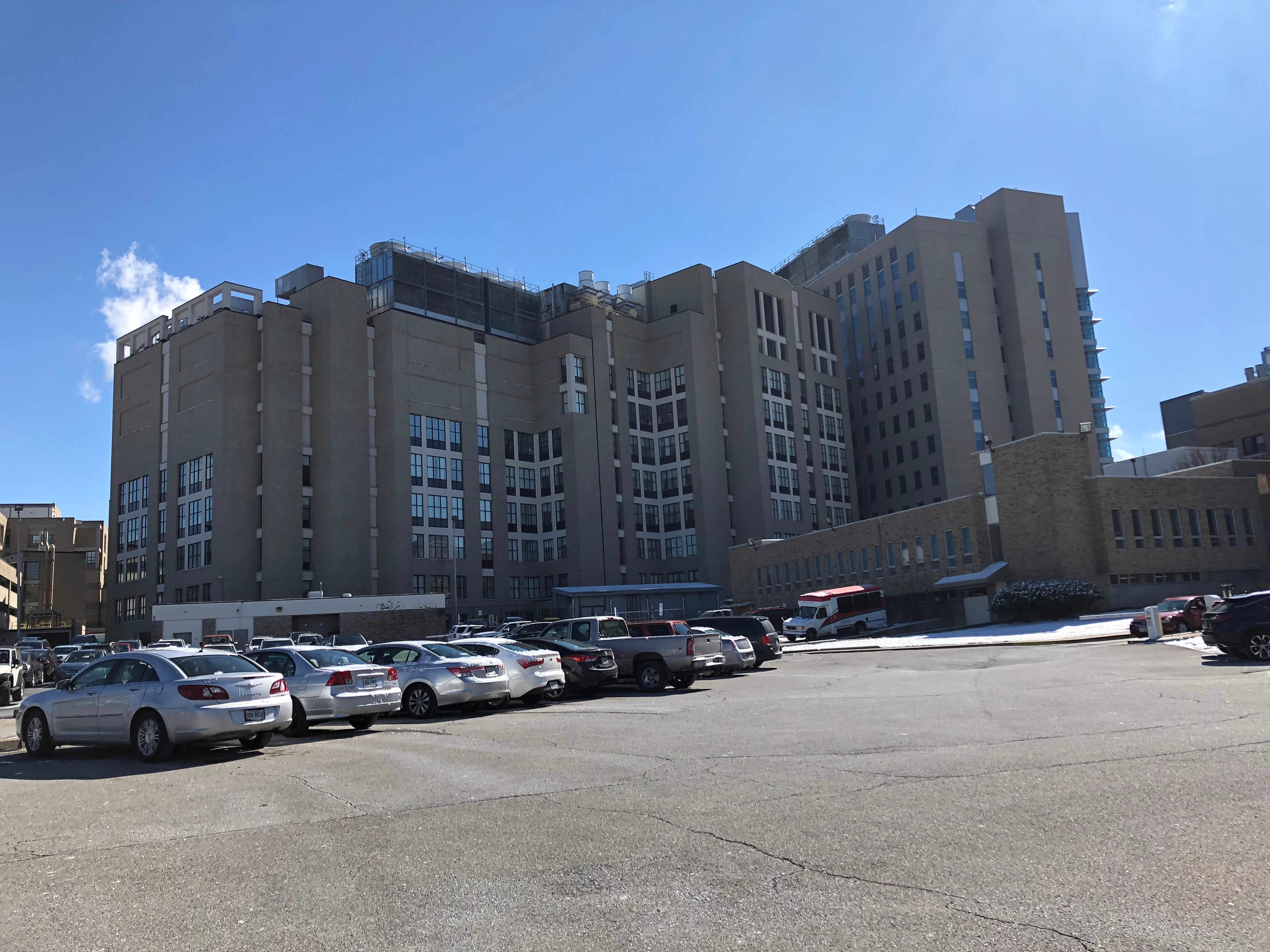 Cincinnati Children's Hospital, Corryville, Cincinnati, OH